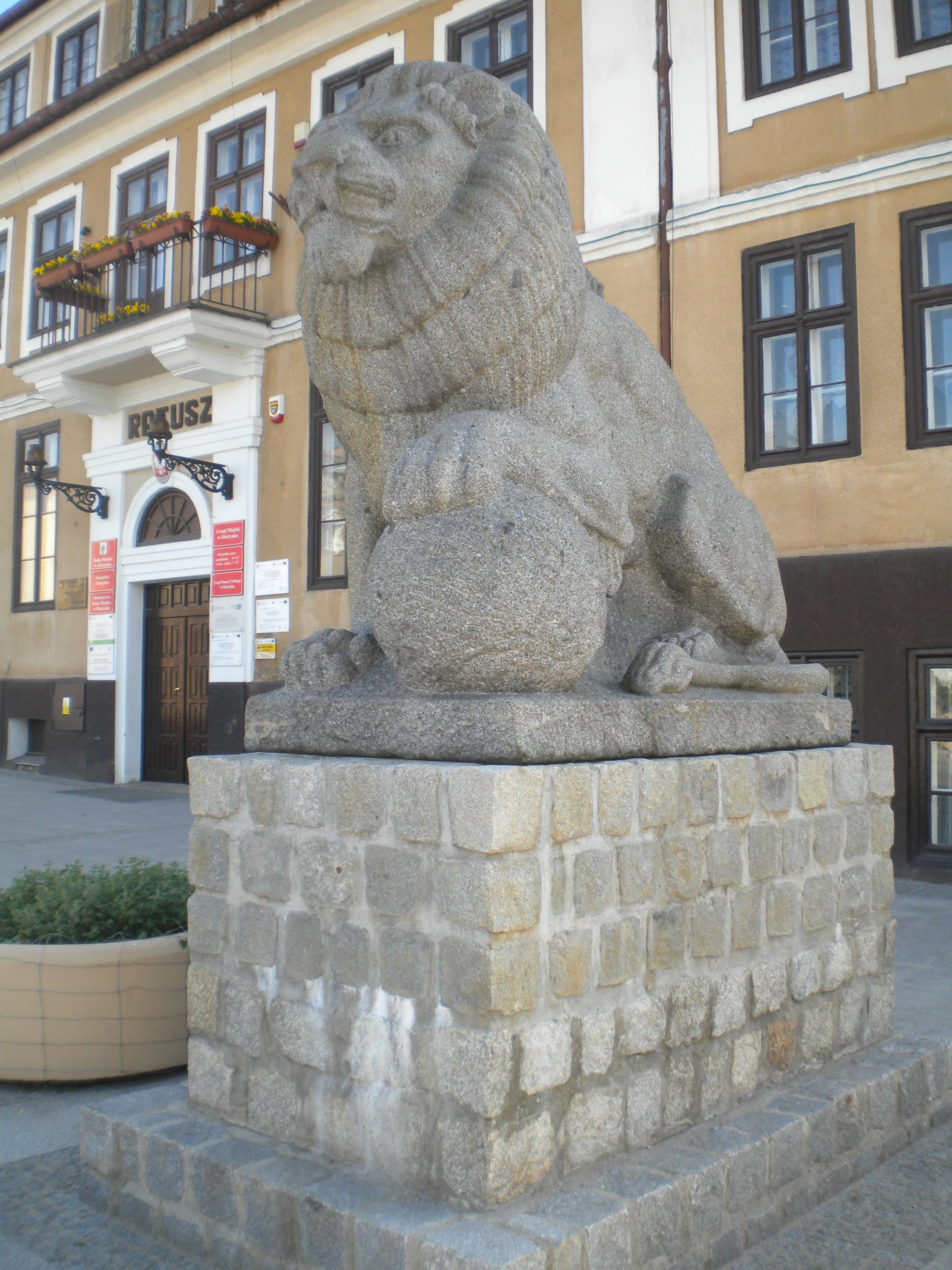 Olsztynek, Rynek - statua kamiennego lwa